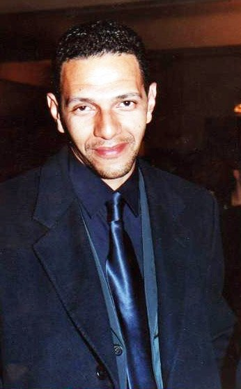 Rocschy Zem à la cérémonie des Césars.